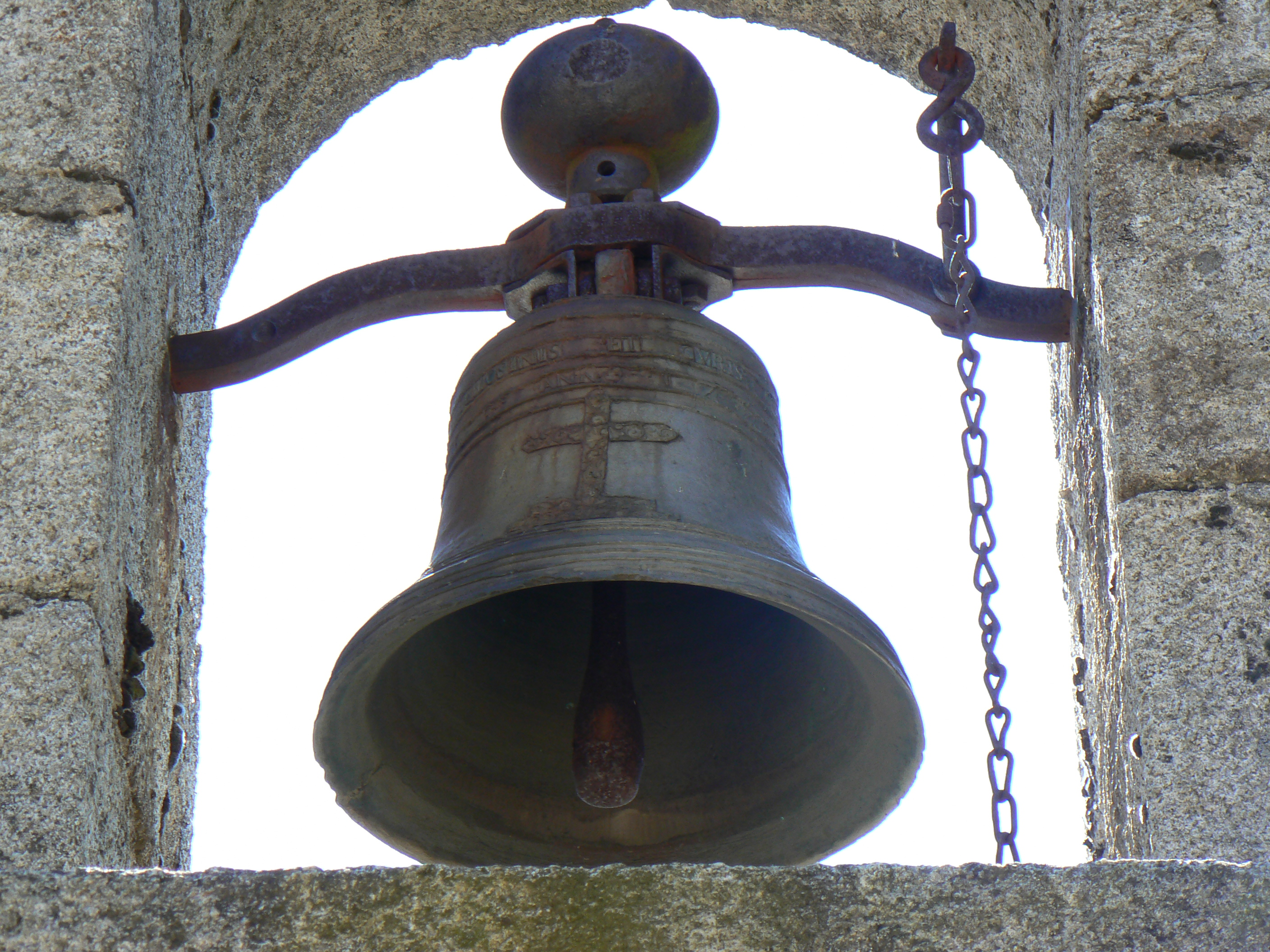 Détail du clocher de tourmente du hameau de Servies, commune de Mas-d'Orcières, Lozère, France